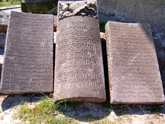 Fragment ekspozycji zewnętrznej Muzeum Ziemi Szprotawskiej, tu: pomnik poległych mieszkańców Witkowa (niem. Wittgendorf).